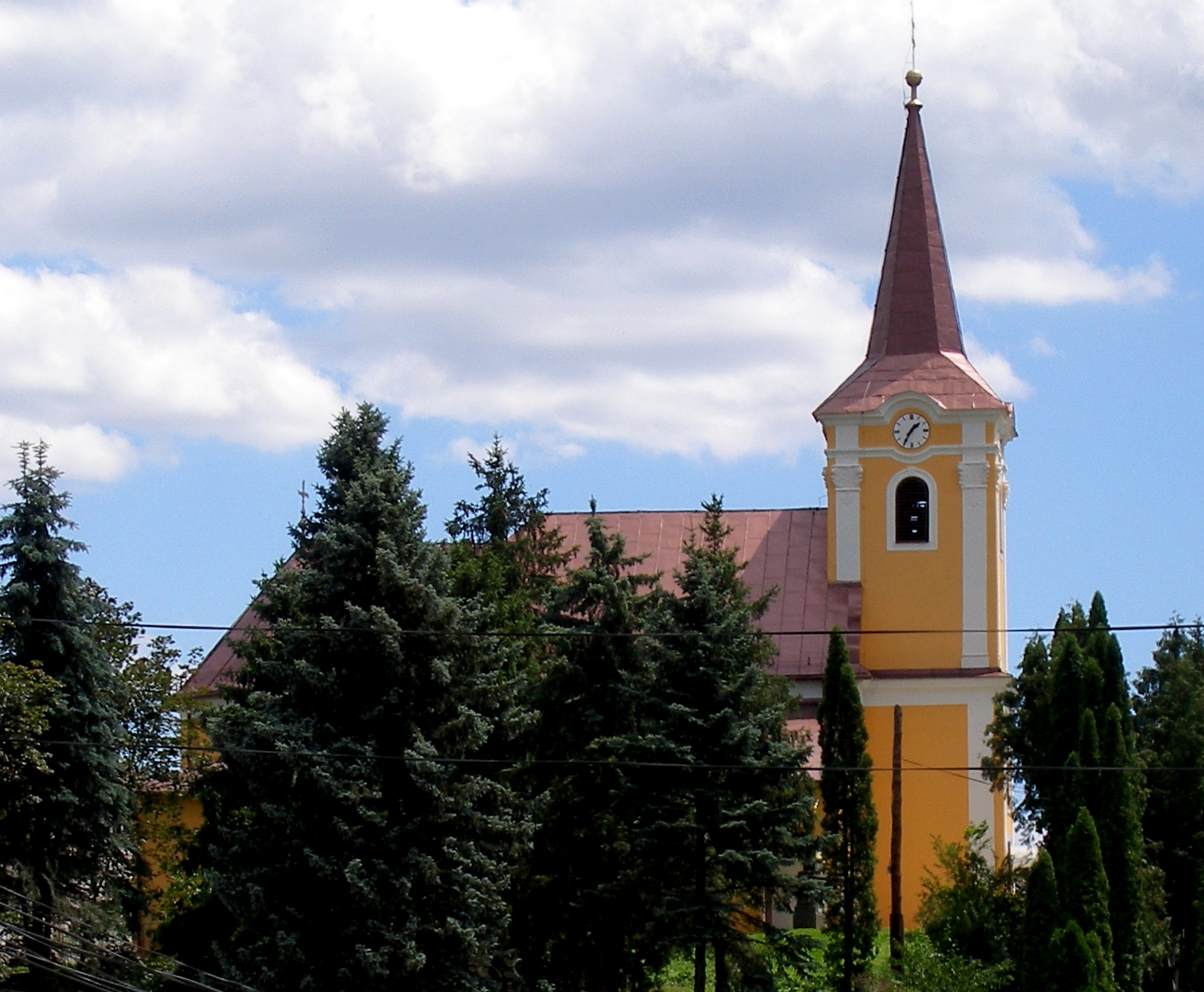 Obec Kojatice v Šarišskej vrchovine, okr.Prešov, región Šariš